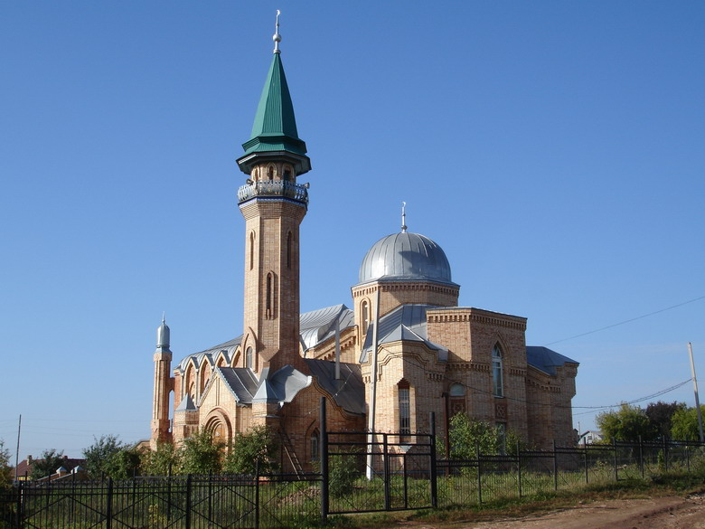 Мечеть в г. Бугуруслан, Оренбургская область, Россия